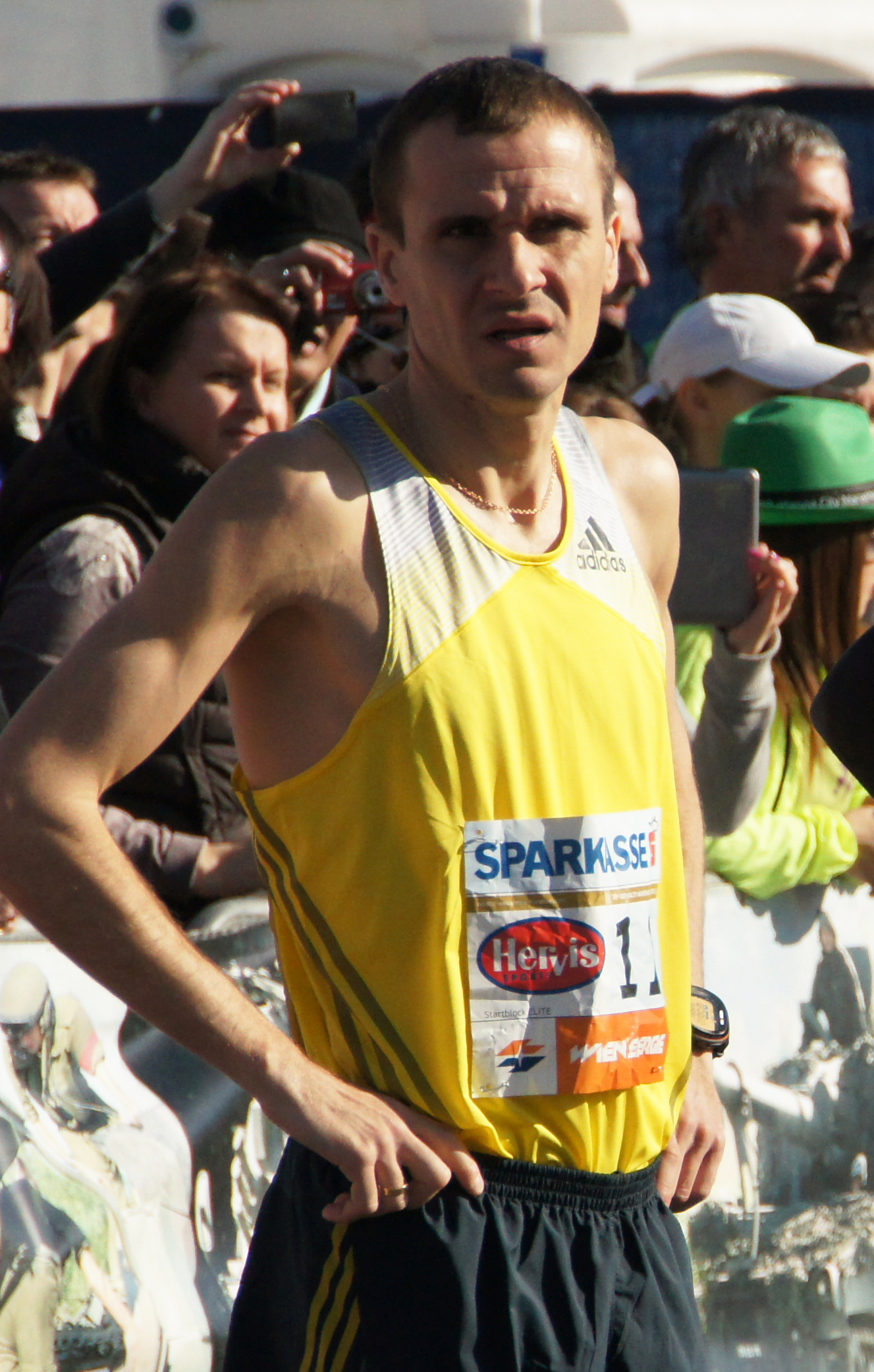 Vienna 2013-04-14 Vienna City Marathon - 11 Oleksandr Sitkovskyy, UKR